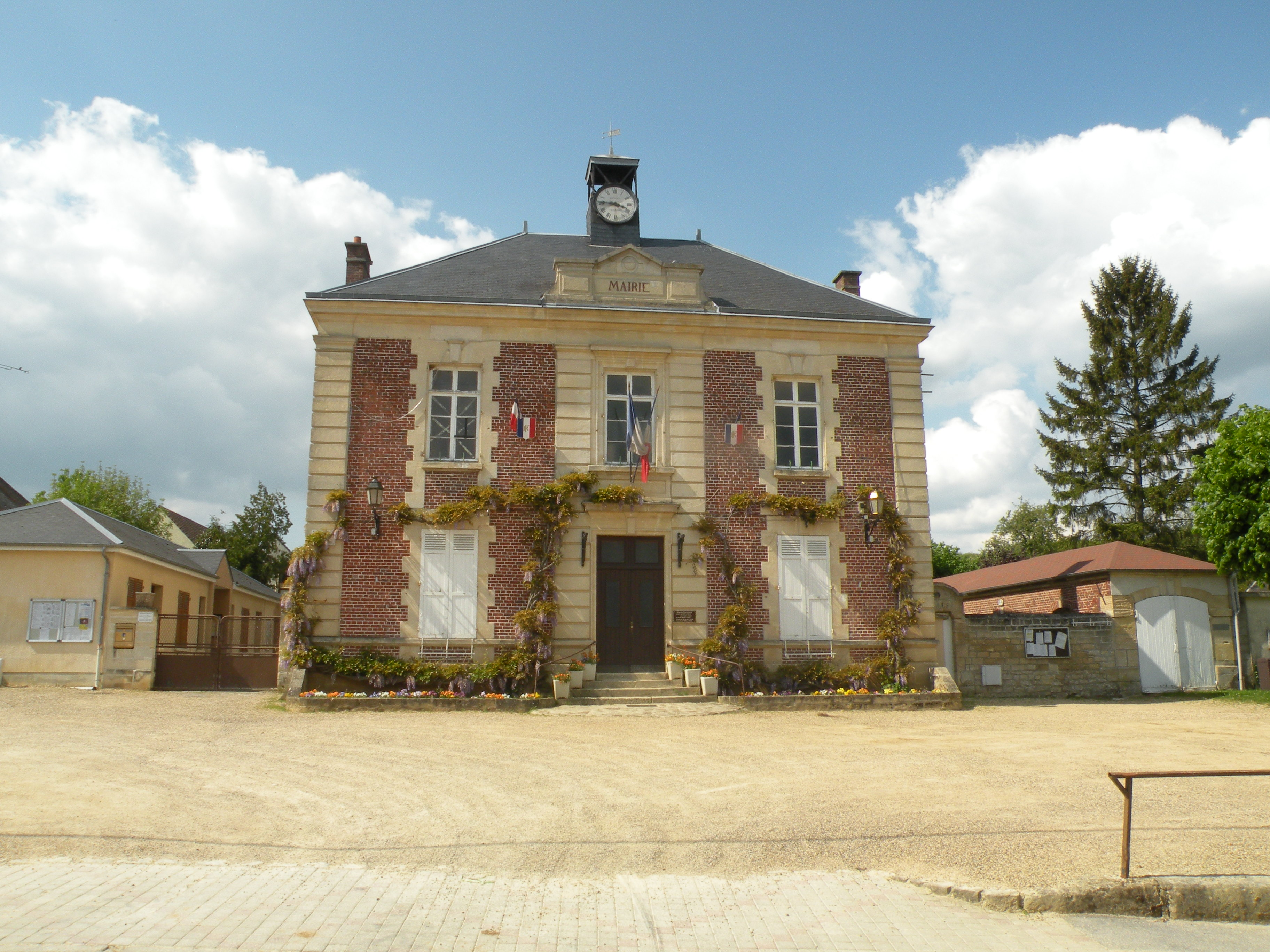 mairie de la commune de Blaincourt-lès-Précy, oise, france